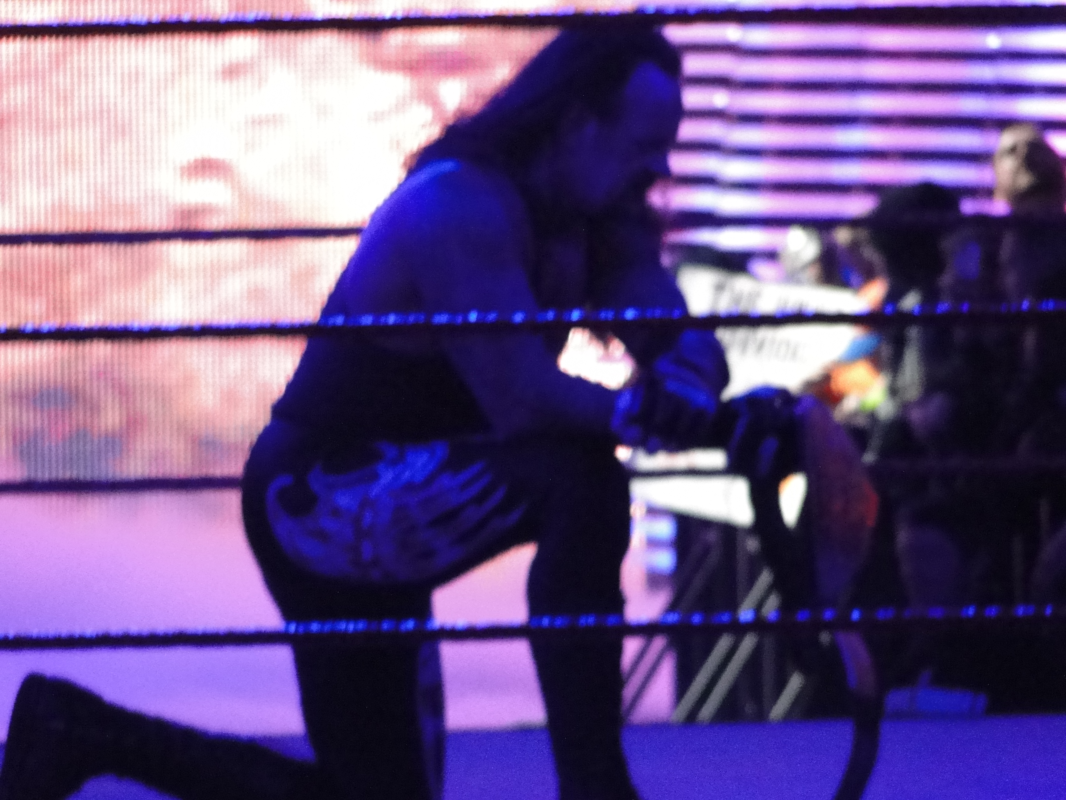 Undertaker after defeat Rey